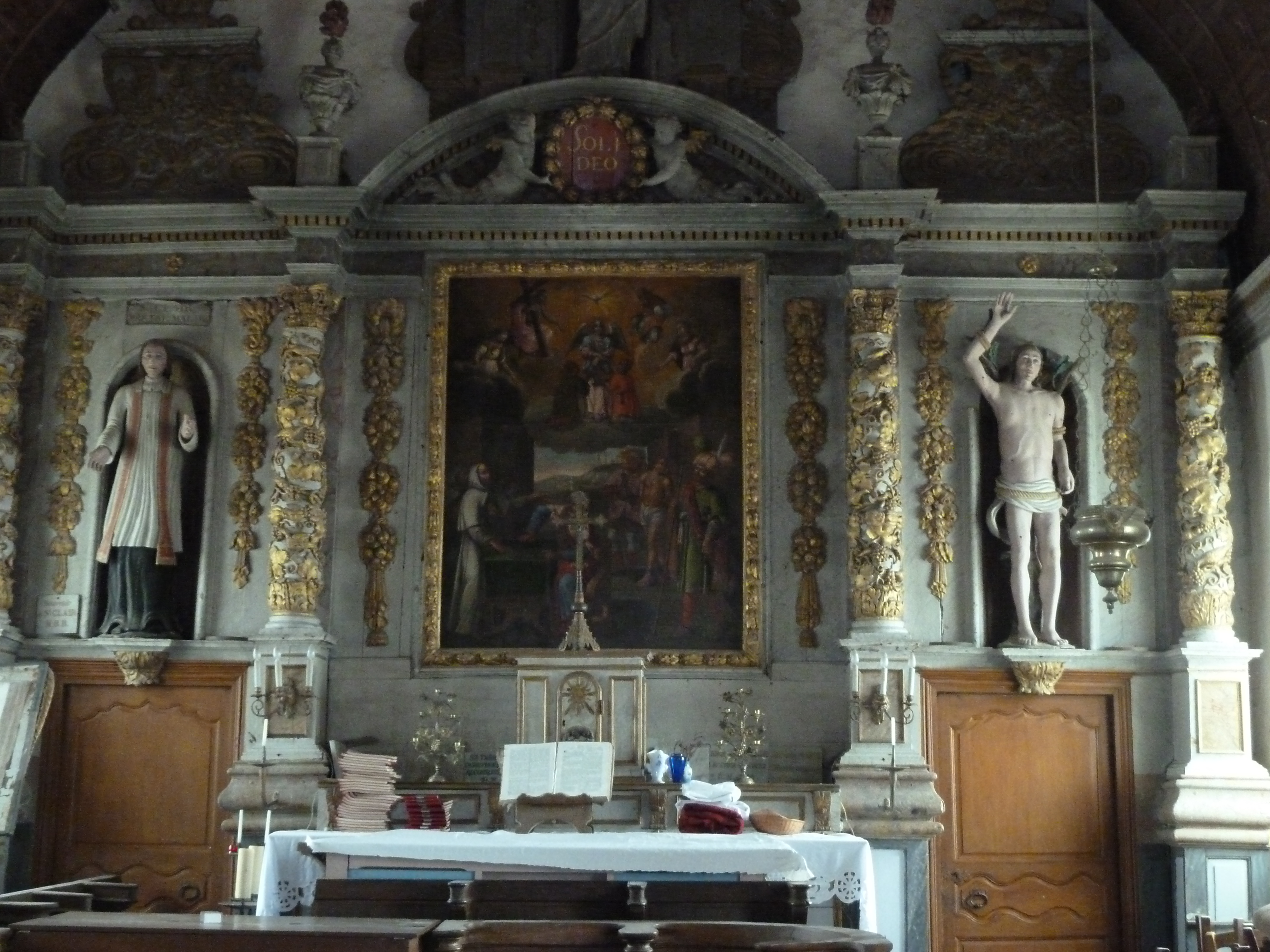 rétable du maître-autel du XVIIème siècle